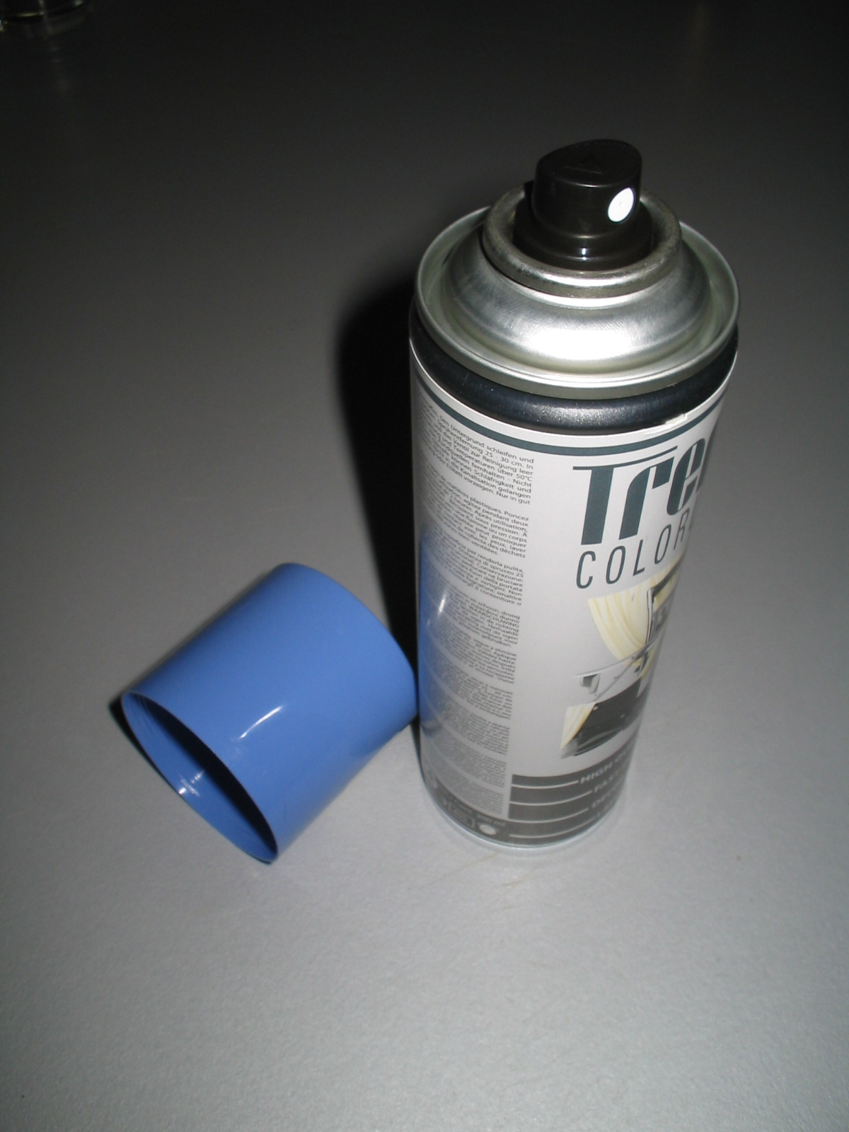 Spuitbus lakverf